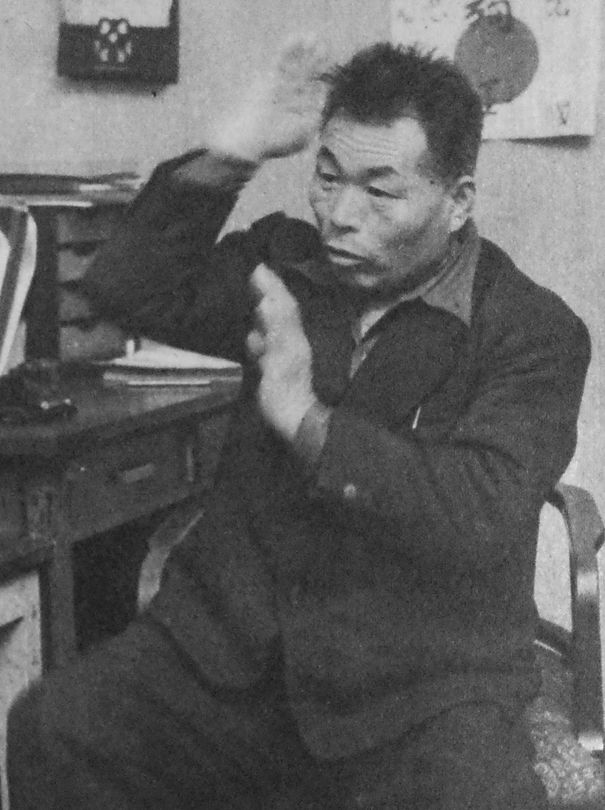 国井道之